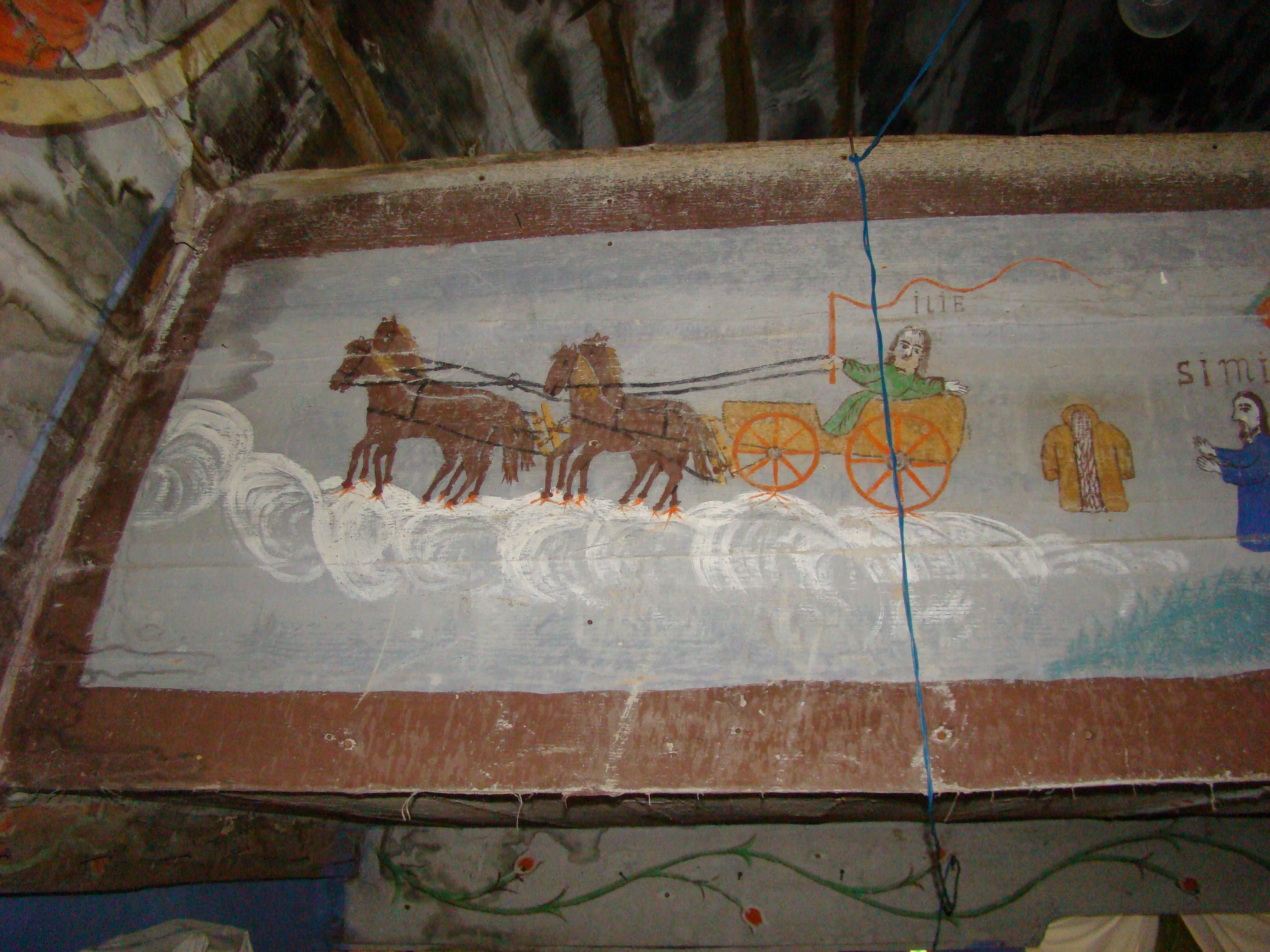 Biserica de lemn "Sfinții Împăraţi" din Aspra